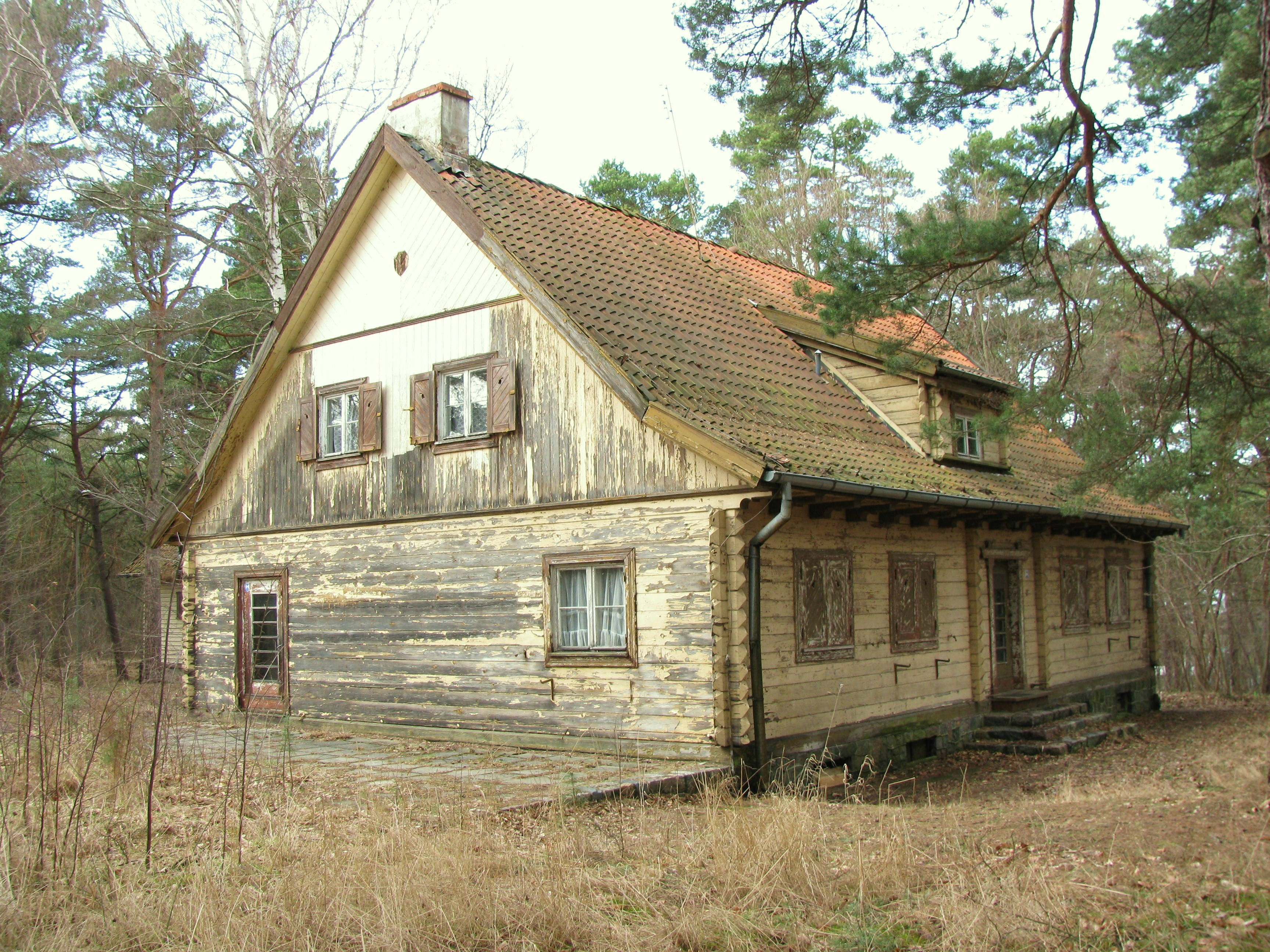 Rezydencja niemieckiego zbrodniarza hitlerowskiego (gauleitera i obergruppenführera SS) Alberta Forstera, Gdańsk Orle.